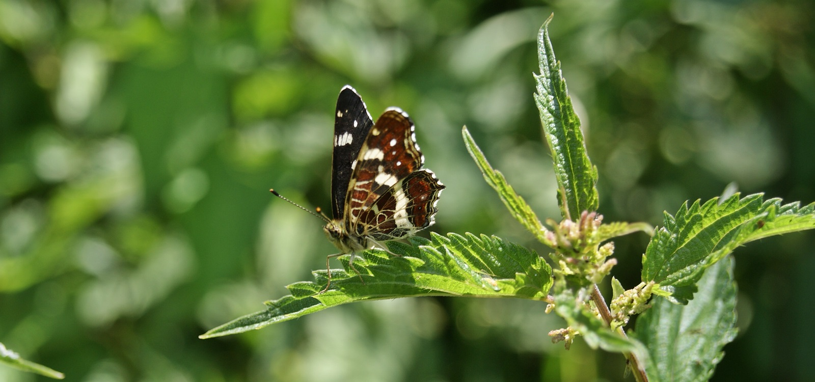 Naturschutzgebiet Dirlenbachtal, Niederndorf, Südwestfalen.